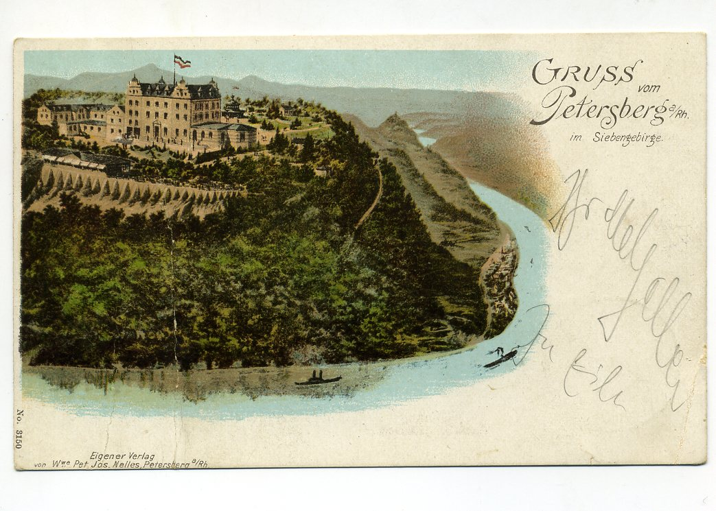 Gruss vom Petersberg a/Rh. im Siebengebirge